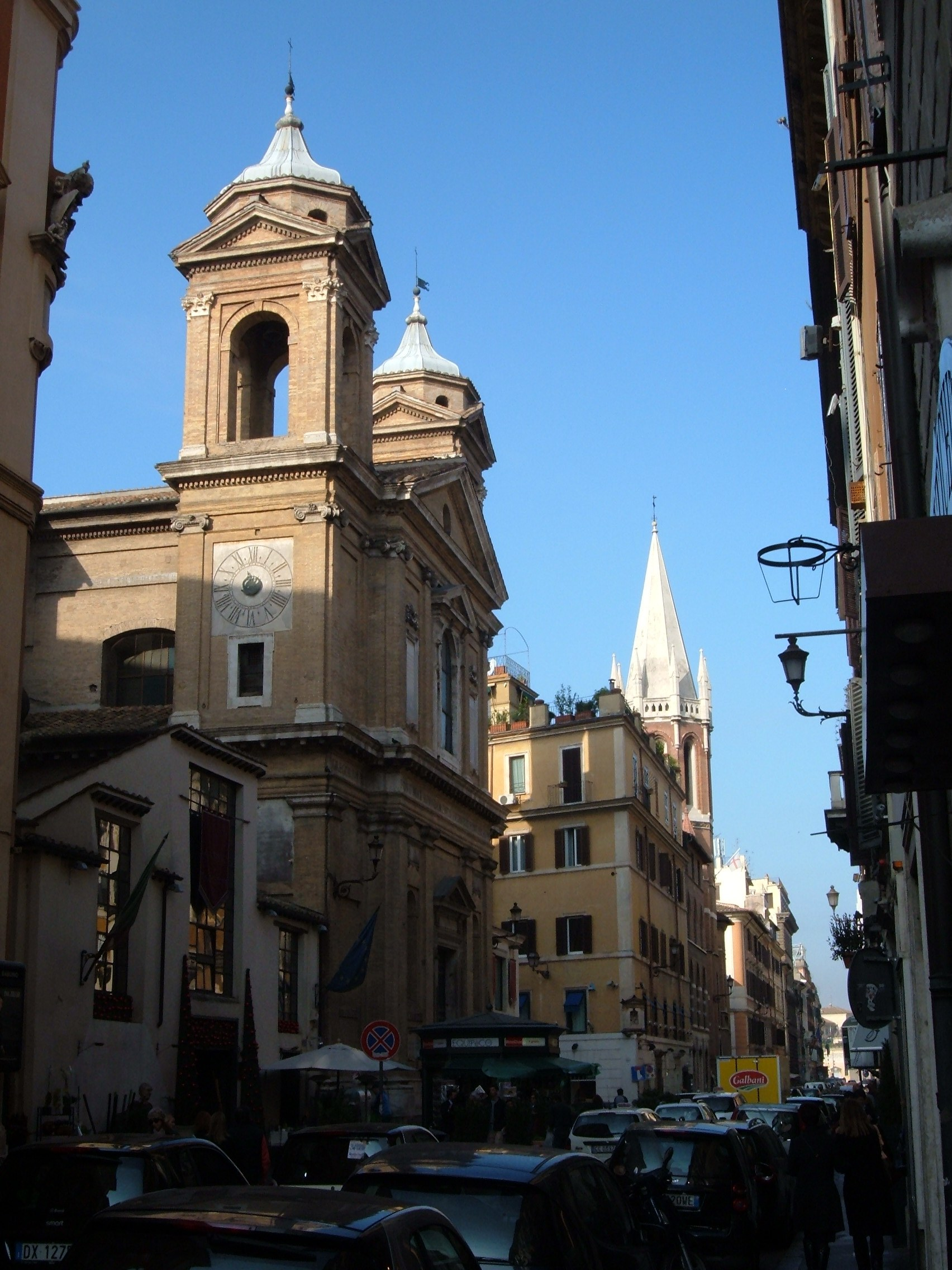 Chiese di Sant'Atanasio e All Saints Church in via del Babuino a Roma.